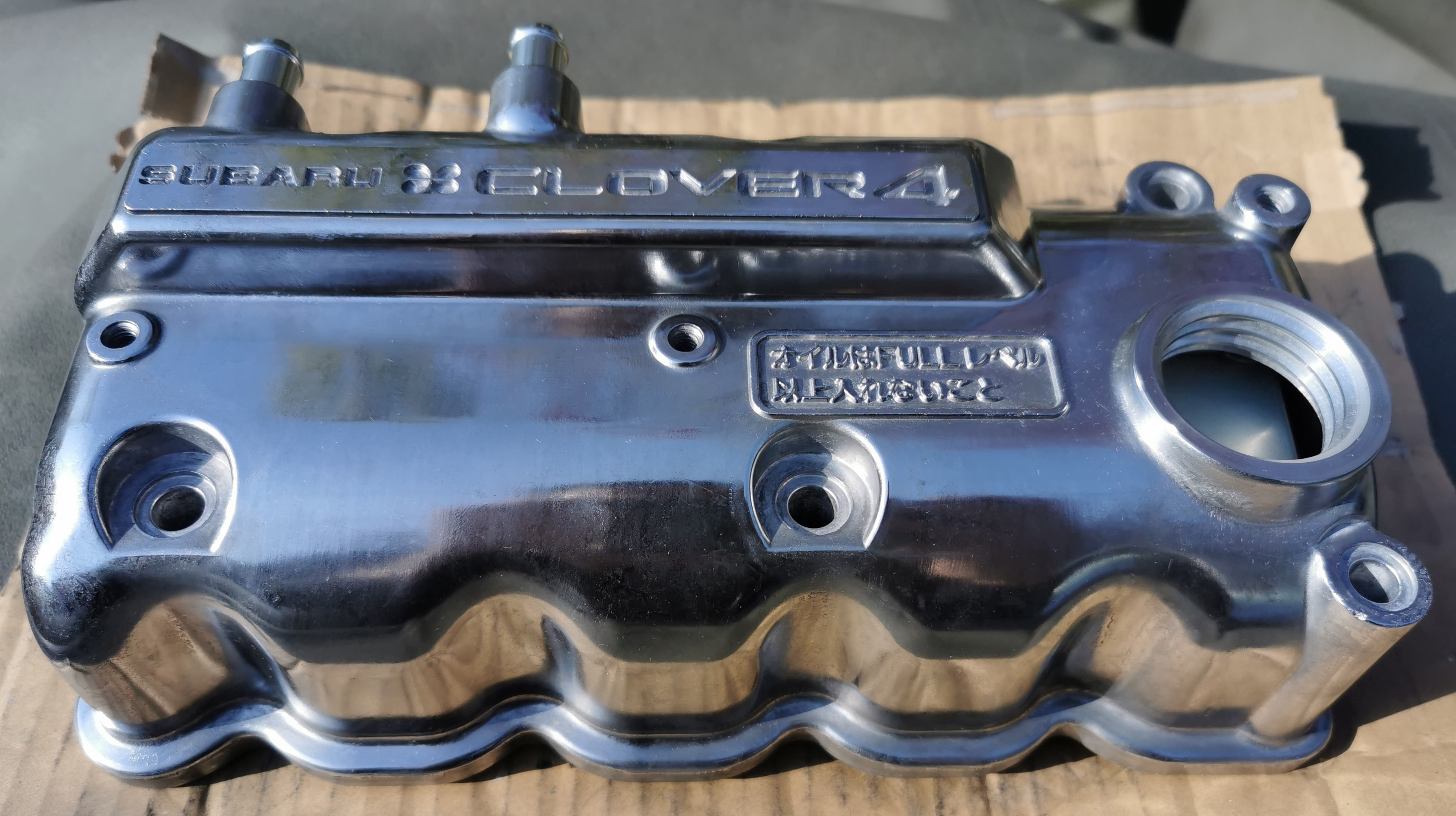 スバルサンバーの、EN07Yエンジン用ロッカ－カバー。